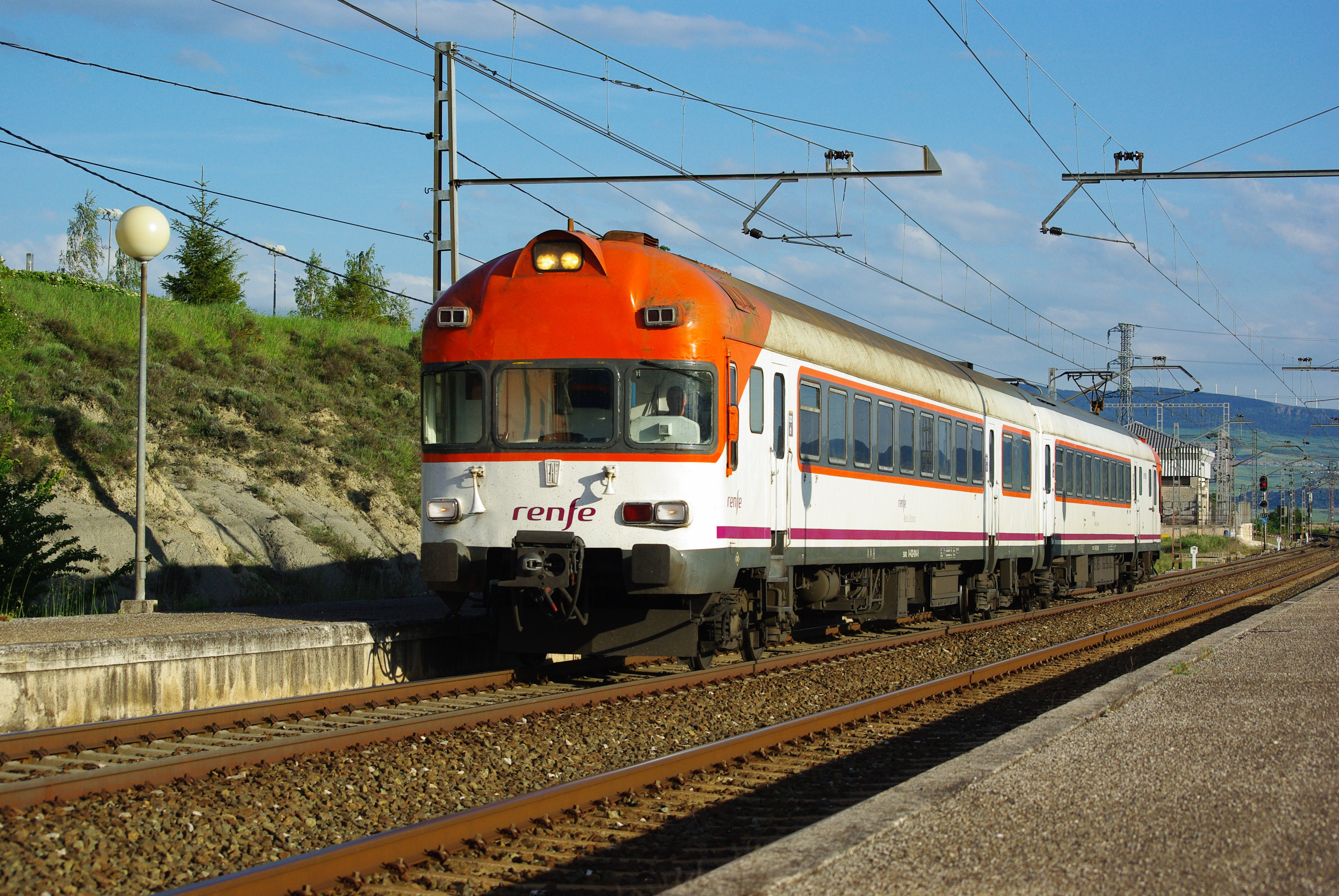 Un automotor eléctrico de la serie 432 de Renfe Operadora en la estación de Zuasti (Navarra). Más de uno los dio por enterrados hace ya un par de años, y aunque razones no le faltarían, el caso es que han aguantado contra todo hasta esta semana. Pero no se van con un mal sabor de boca, se van con casi 40 años bajo sus pantógrafos, y el haber sobrevivido a series más modernas..440, 276, 250, 444, 448. Es por eso que esta era sin duda alguna una de las mejores series de trenes que Renfe ha tenido. Podéis hacer todas las quejas que queráis, pero los datos son los datos y ahí están. Cierto que ultimamente ya n oestaban para muchos trotes, aunque el trato que llevaban por parte de renfe era aún peor.... Bueno, hasta donde yo tengo conocimiento (es decir, casi ná) este fue el ultimo servicio comercial de los 432 en Pamplona, el regional a Vitoria de las 19:40 del Miércoles. PD: Gracias a Jacob, por avisarme, a Javier López por comentarlo, y a todos los que salisteis a sacarles una foto sea cuando fuere. COMENTARIO FINAL: Se busca posible aficionado al ferrocarril que estuviese el miércoles a las 19 en la estación de Zuasti. Coche: Renault Megane Motivo: Si, era yo el que estaba en la estación xD Gracias por pasaros!